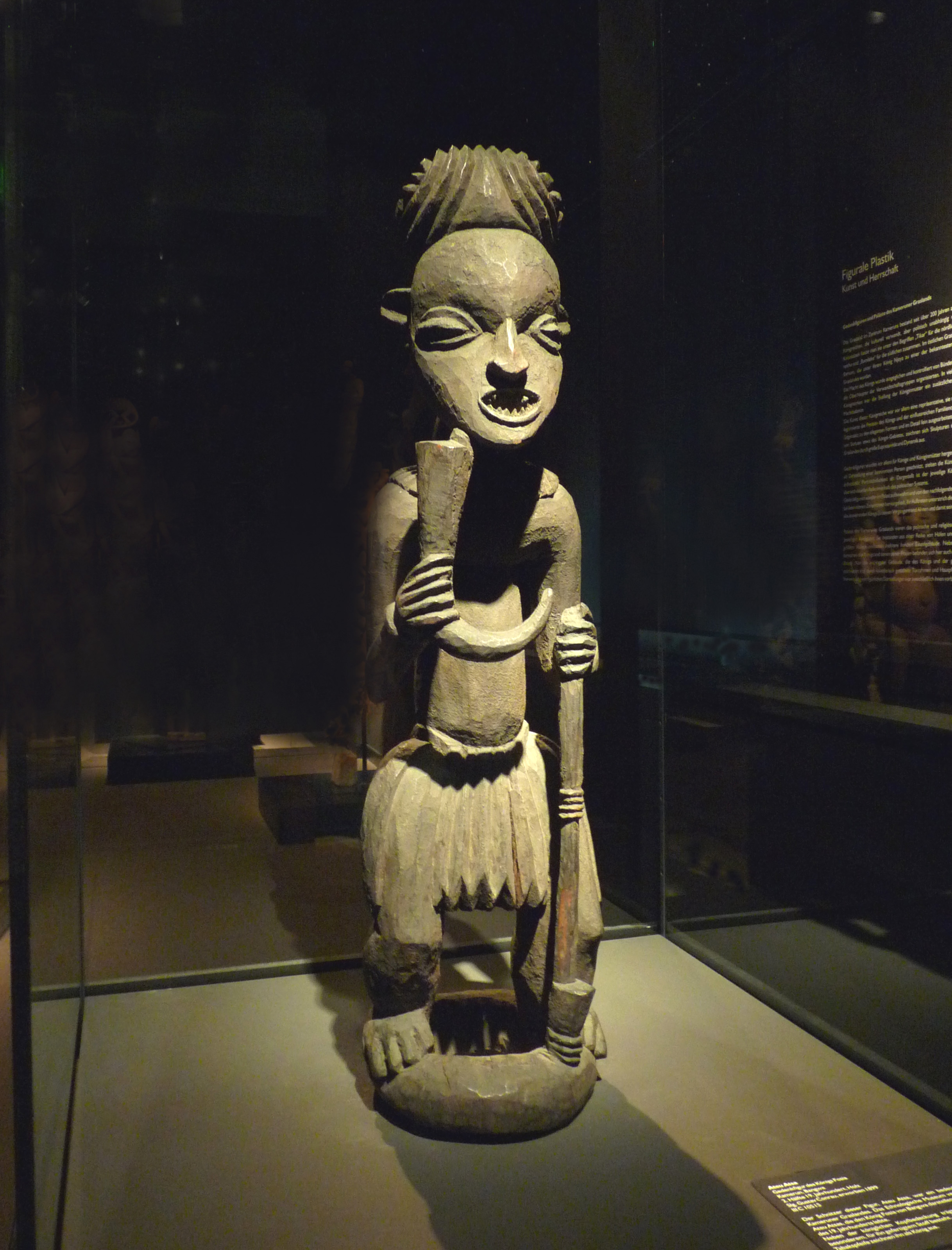 Statue commémorative du roi Fosia, sculptée par Ateu Atsa (vers 1840-1910). Cameroun, Bangwa. Bois. 2e moitié du 19e siècle (Musée ethnologique de Berlin)